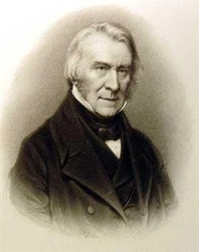 Joseph Henry Green